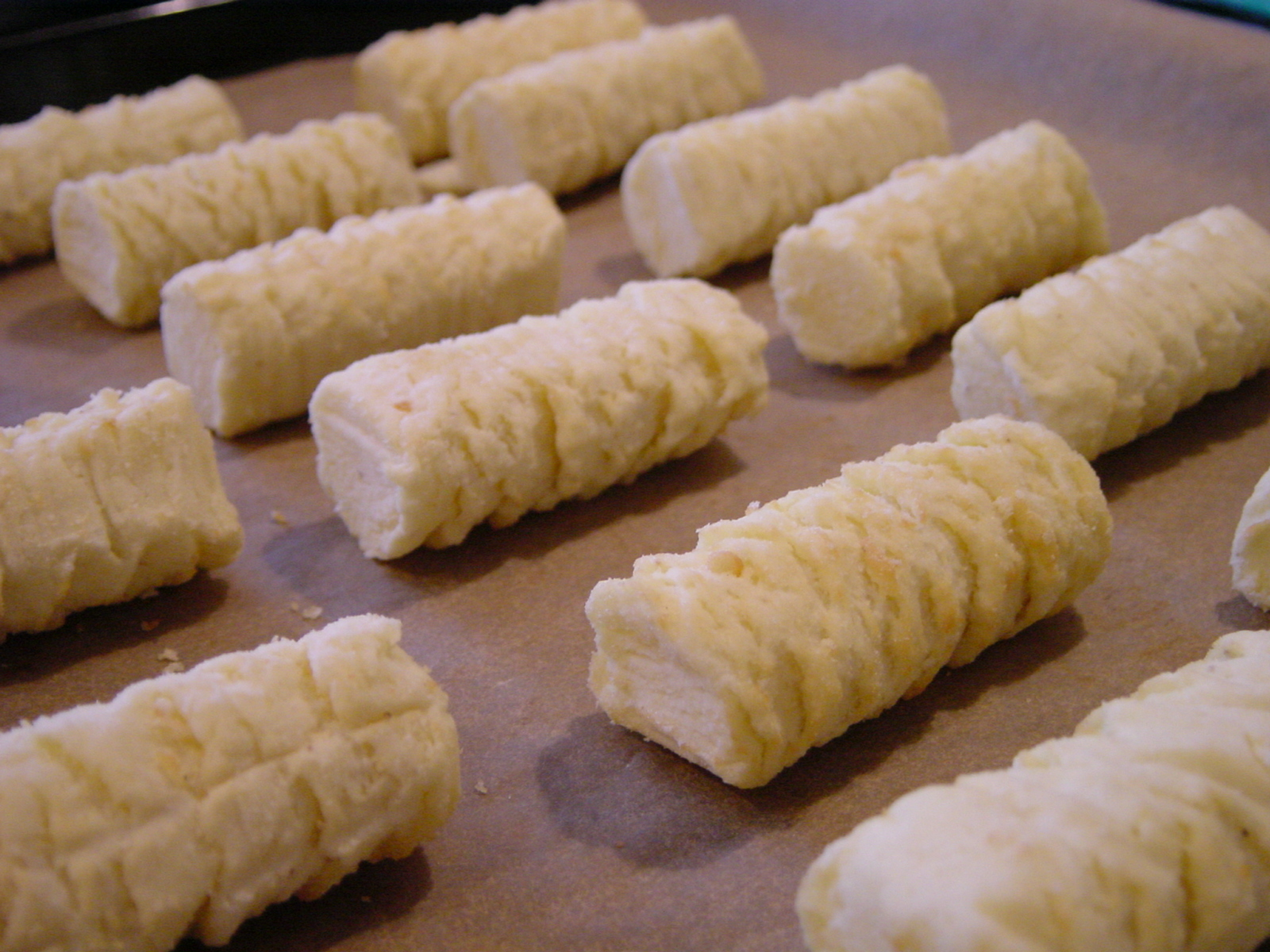 Tiefgefrorene Kartoffel-Kroketten für die Zubereitung im Backofen oder der Pfanne.